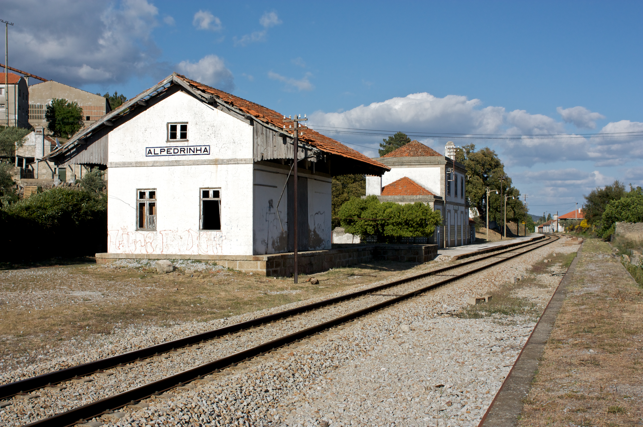 Tipo: A Apeadeiro Local: Alpedrinha Linha da Beira Baixa, PK 128 Data e hora: 11 de Abril de 2009 17h46